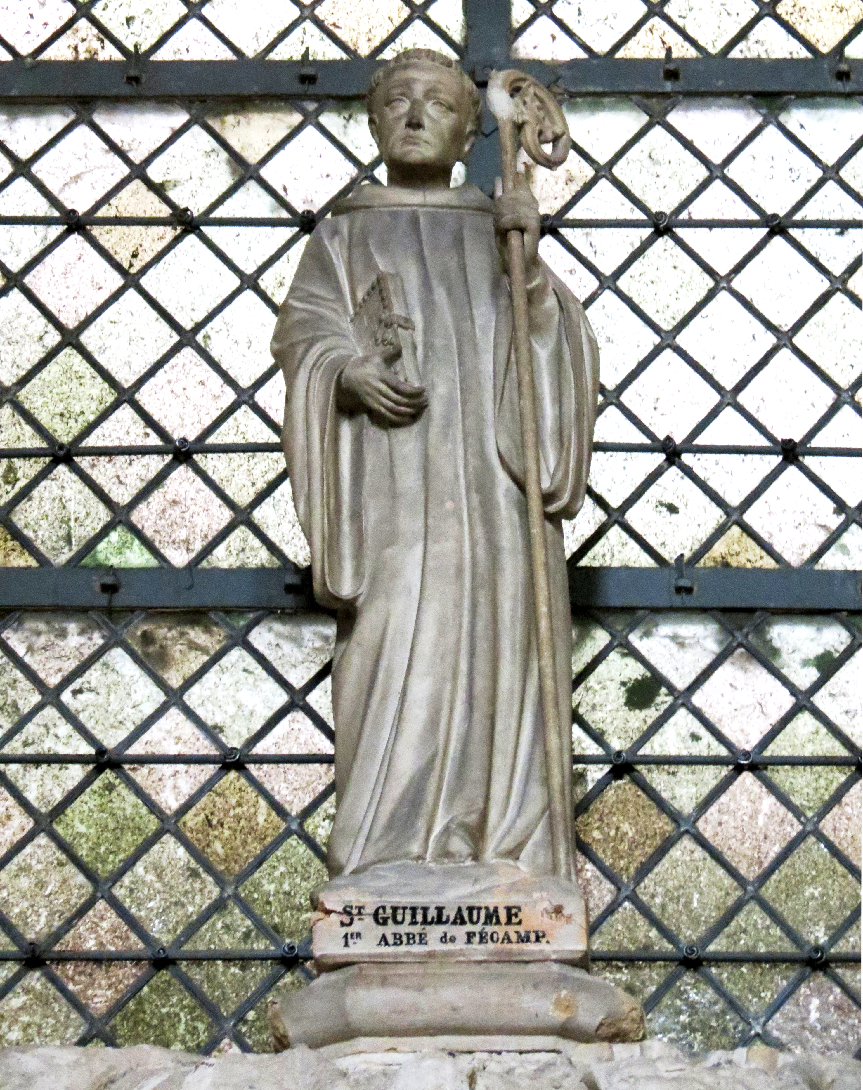 Guillaume de Volpiano, premier abbé de Fécamp (1001-1028).